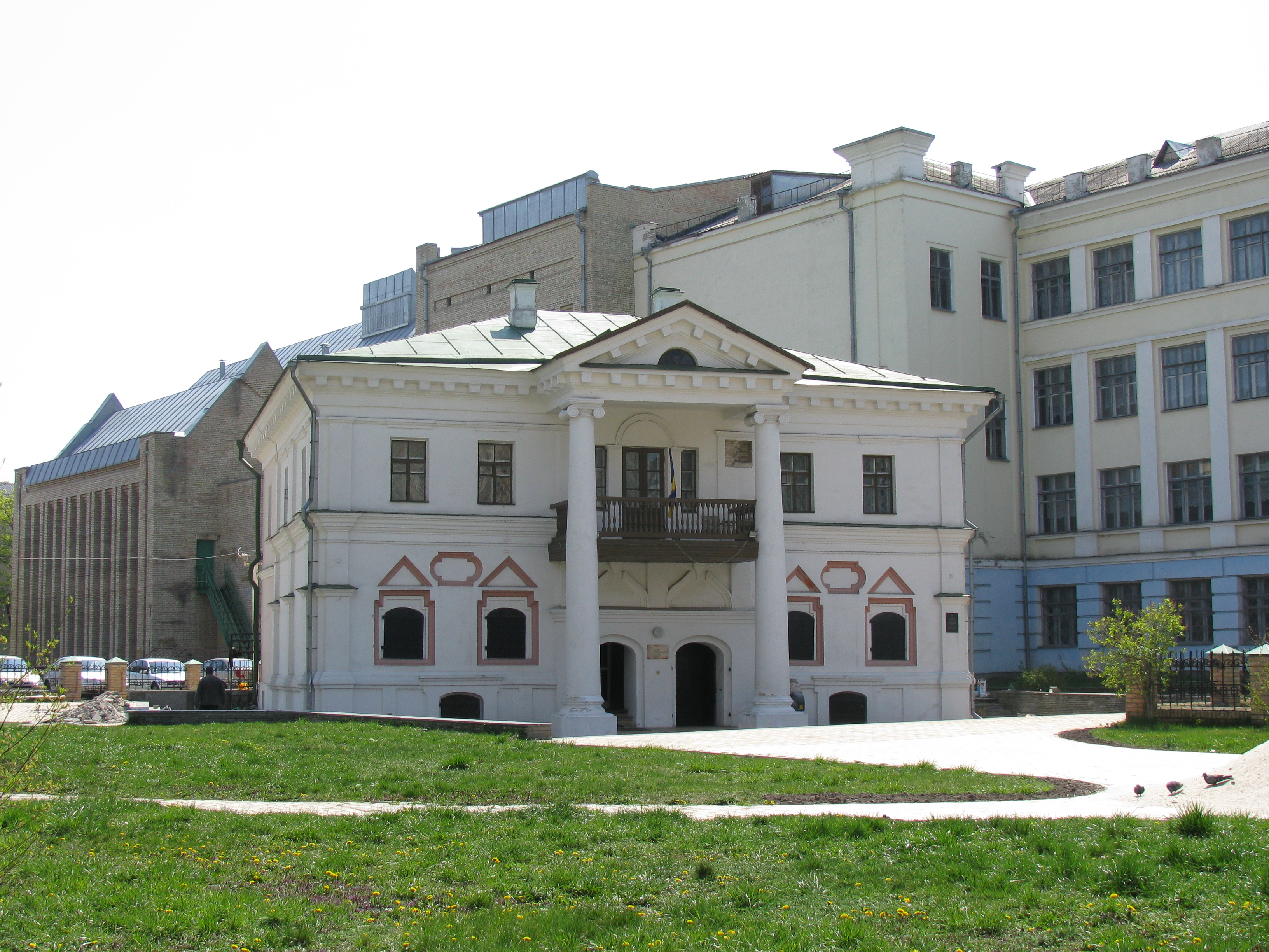 Будинок житловий («Будинок Мазепи»), Київ, Спаська вул., 16-б